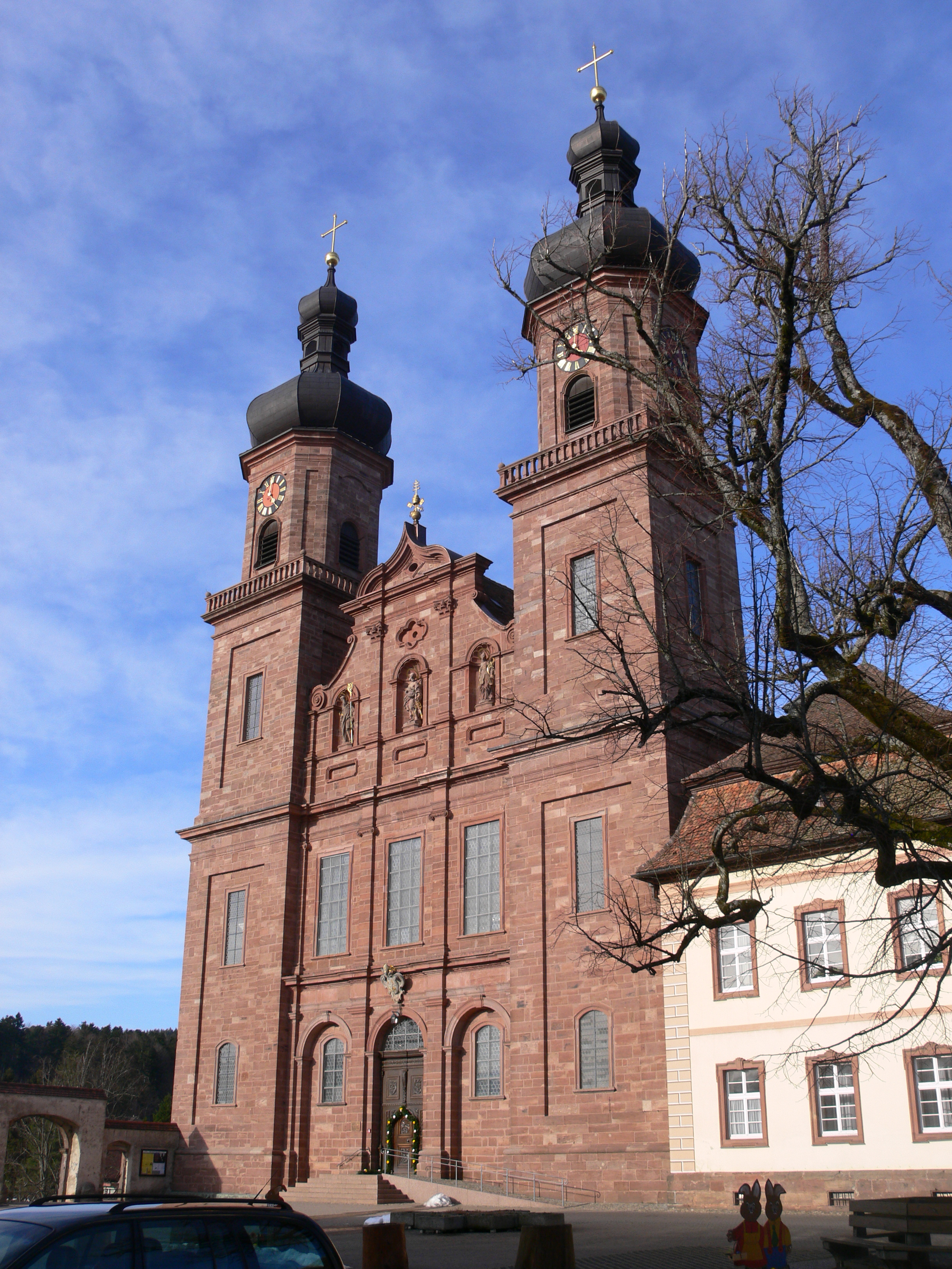 Pfarrkirche St. Peter (ehem. Klosterkirche St. Peter auf dem Schwarzwald): Fassade